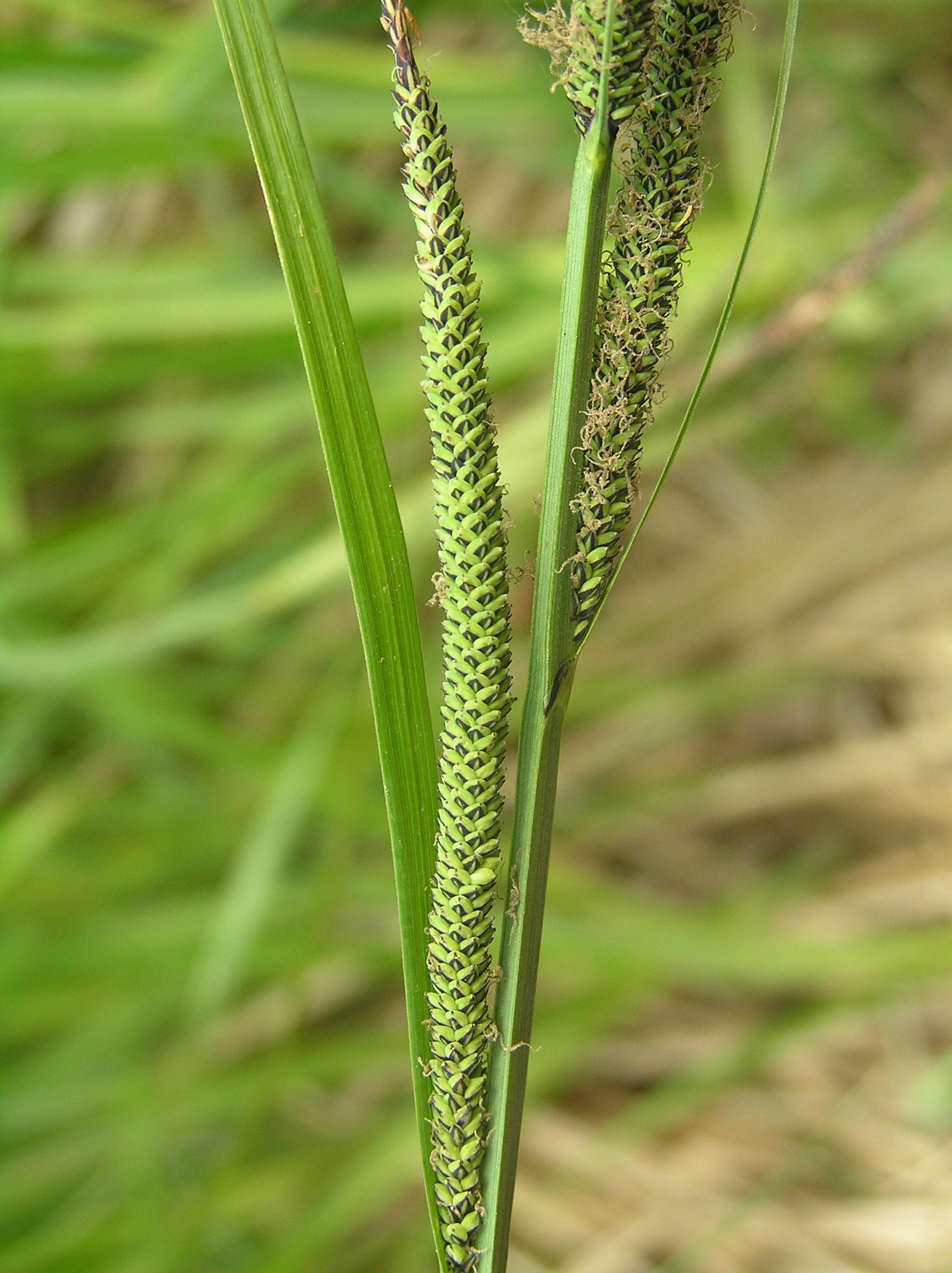 Carex elata, Břeclav, Czech Republic